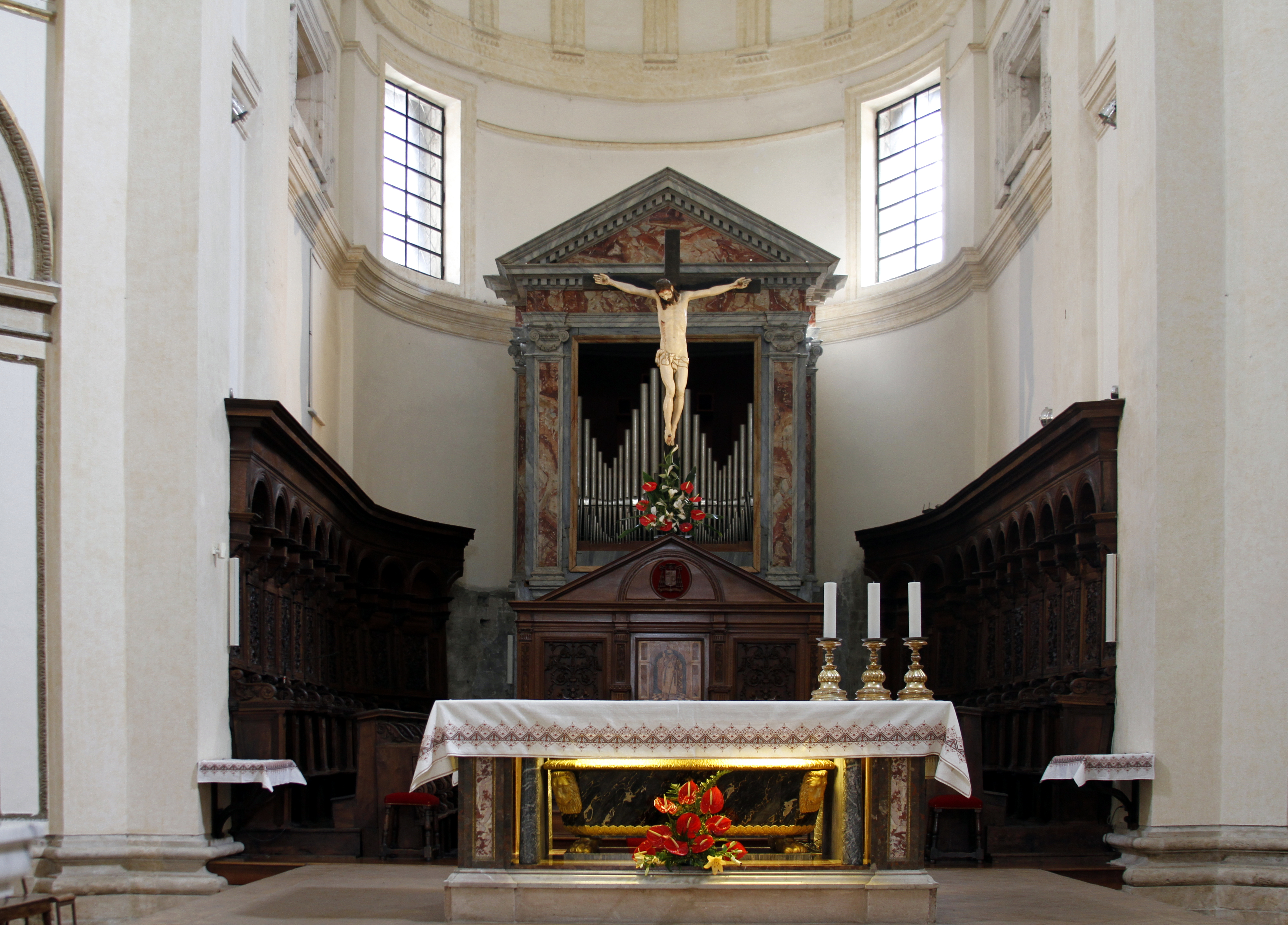 Main altar - San Rufino - Assisi